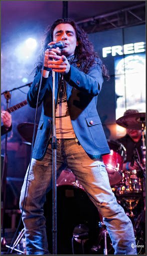 Luis Blanco Patus